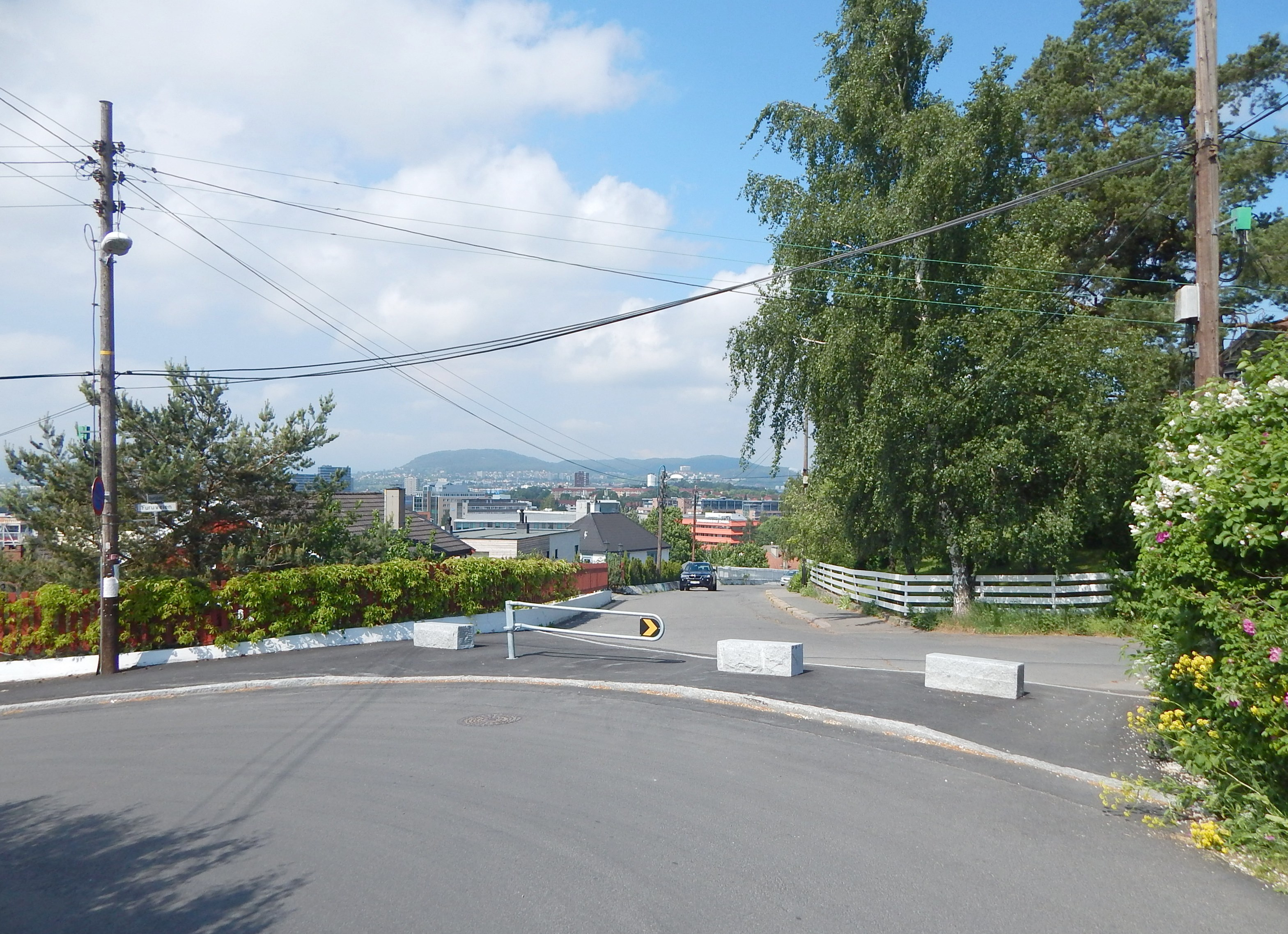 Høyenhallveien